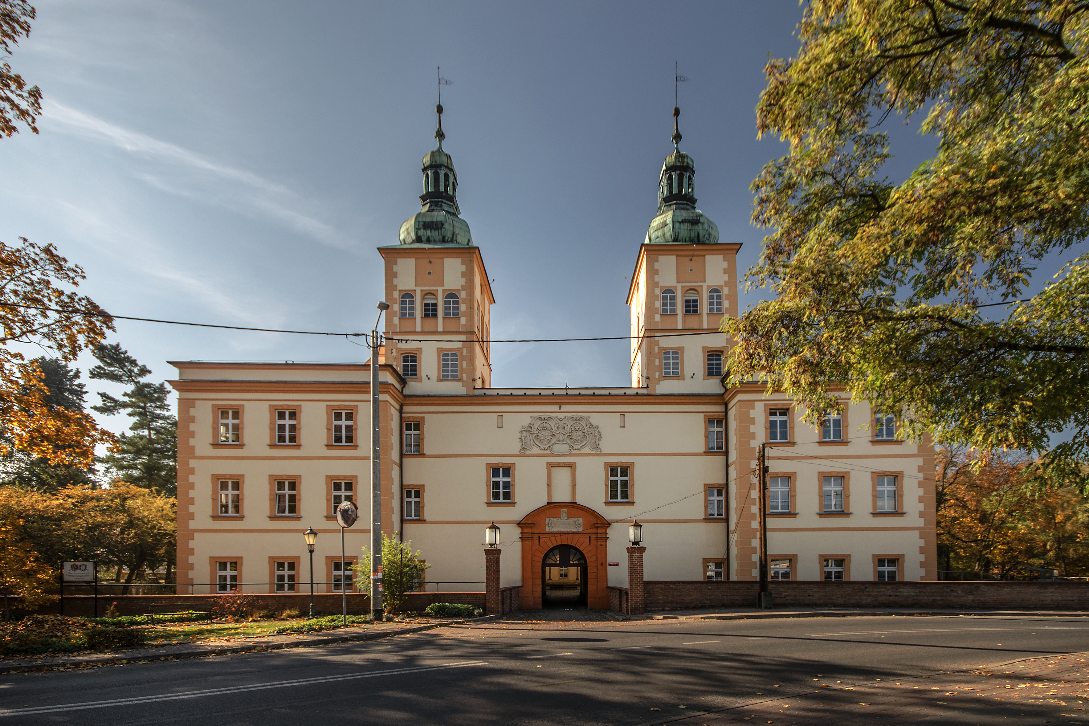 Prószków, zamek, 1563, 1677